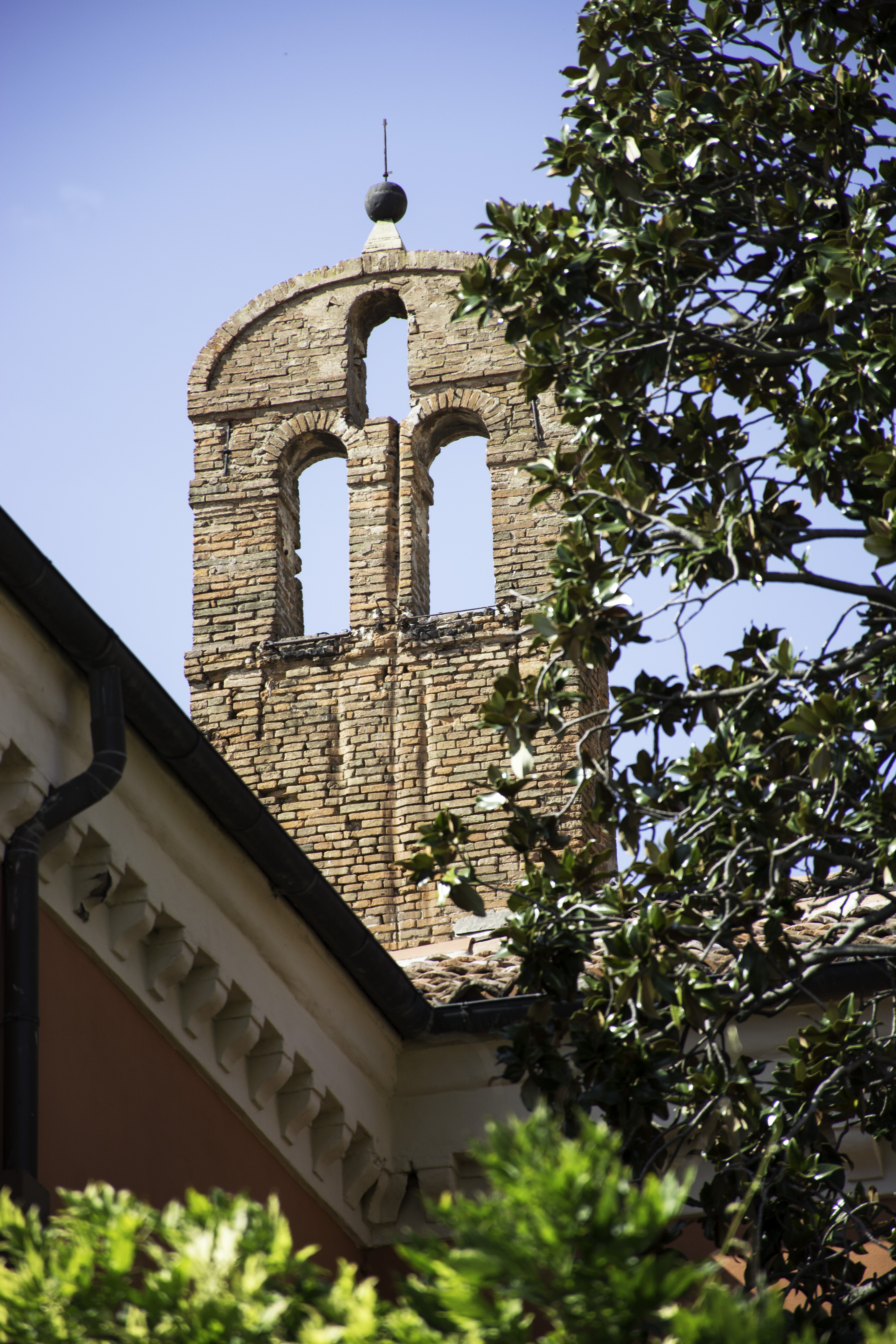 ex chiesa del Carmine This is a photo of a monument which is part of cultural heritage of Italy.